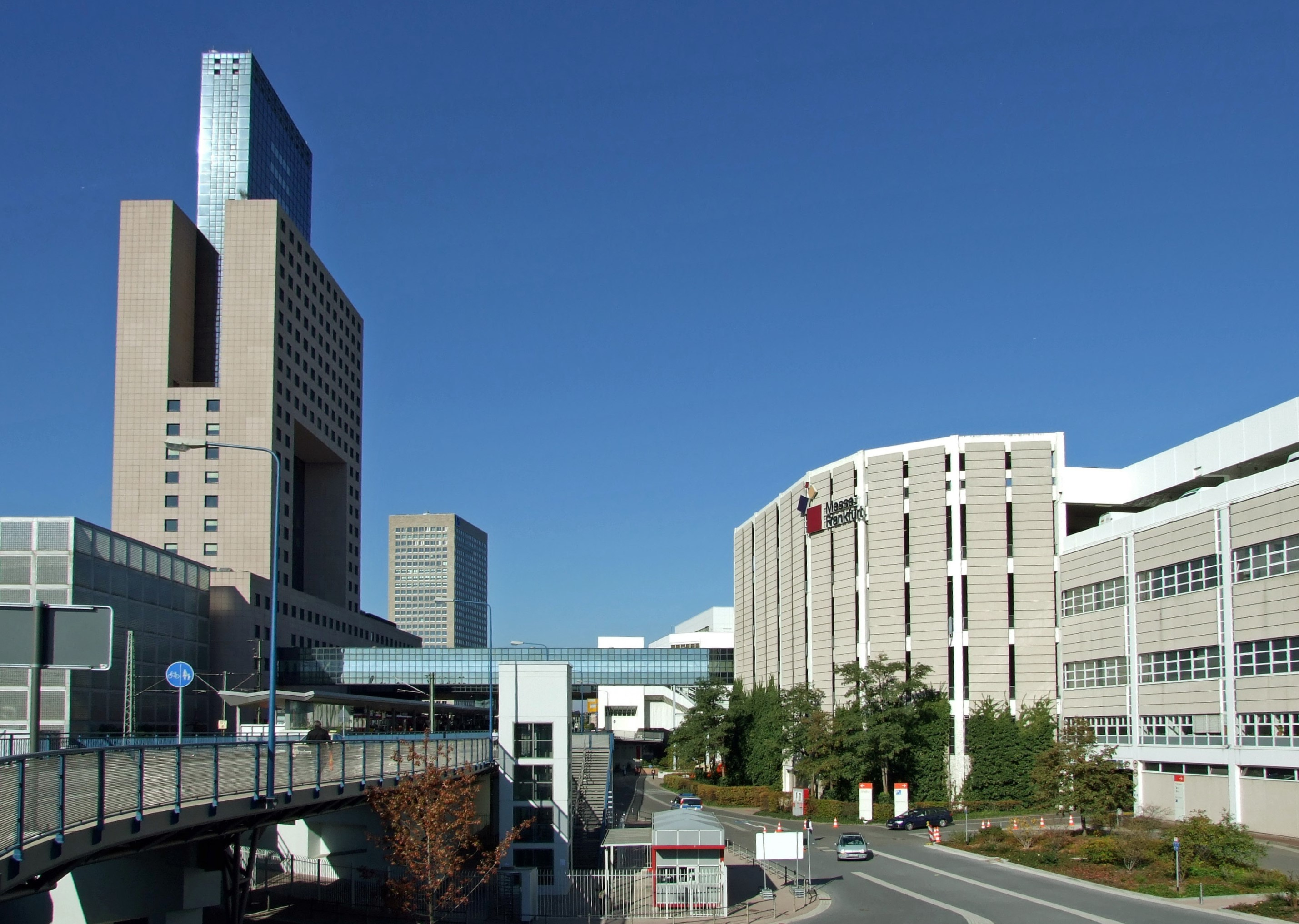 "Torhaus", Messebahnhof (S-Bahn) und Messegelände in Ffm, von Emser-Brücke (West) gesehen